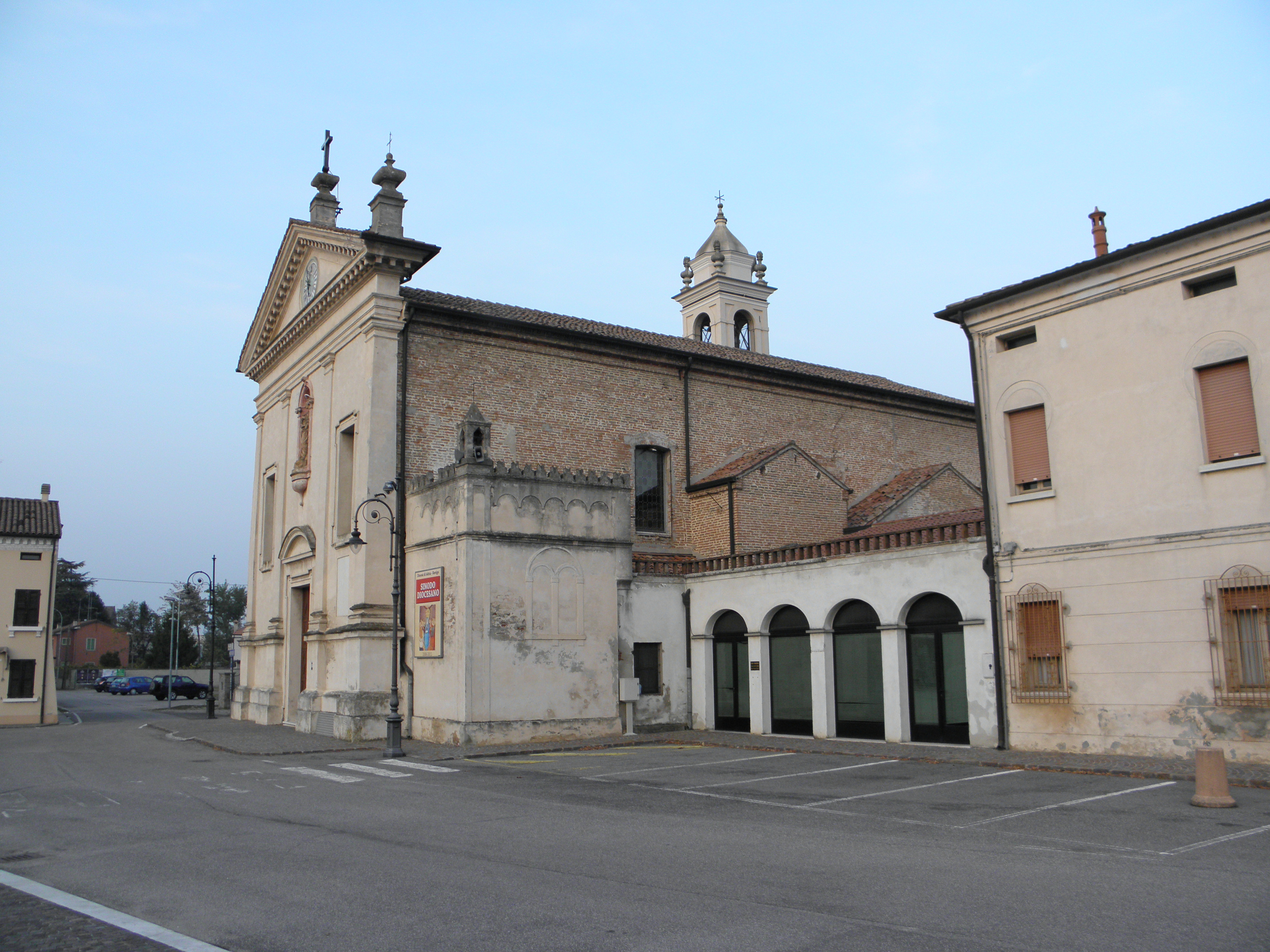 Gaiba: la chiesa parrocchiale ed arcipretale di San Giuseppe, sposo della Beata Vergine Maria e parte delle strutture che si affacciano sull'omonima piazza.